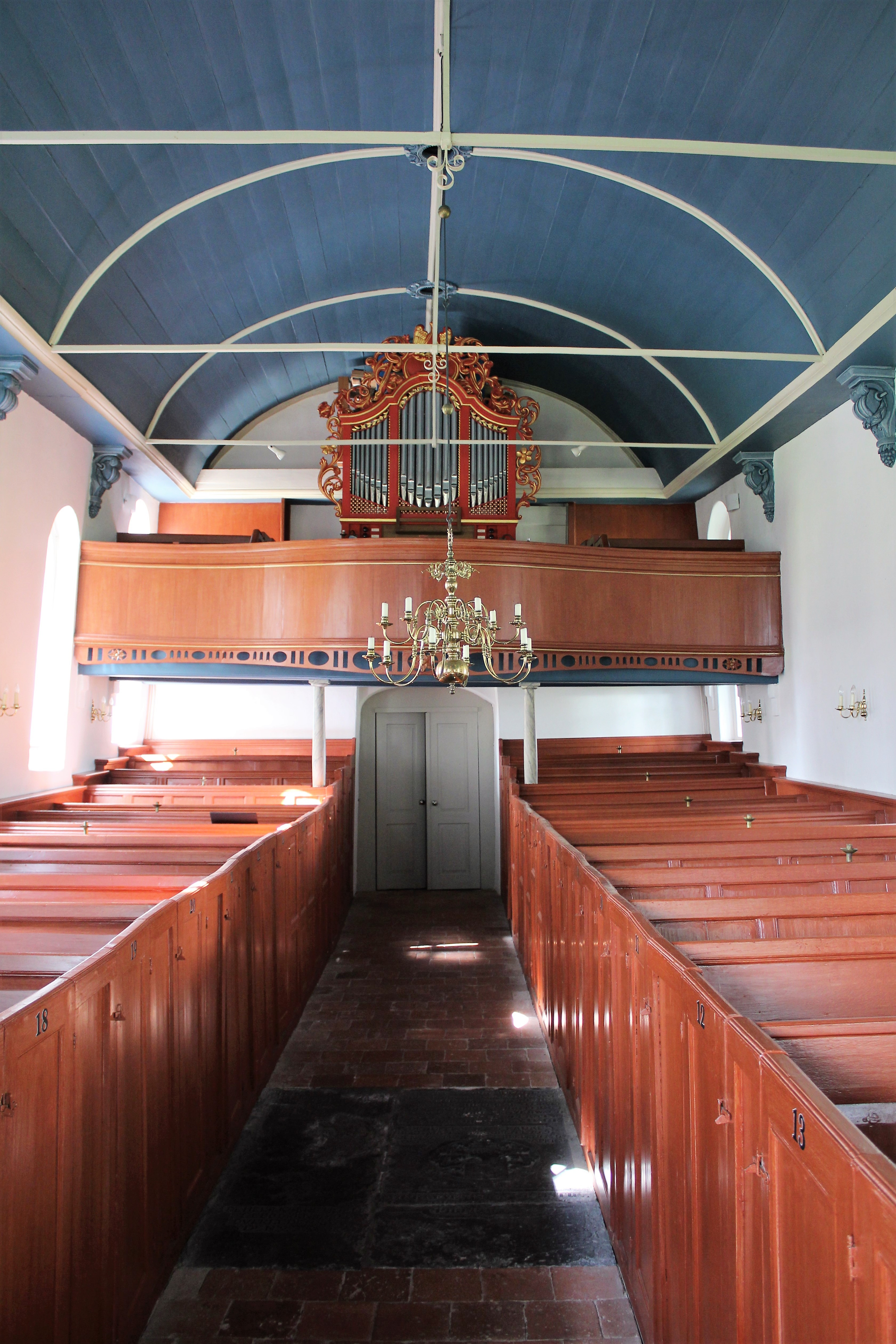 Ev.-reformierte Kirche Böhmerwold, Gemeinde Jemgum, Landkreis Leer, Ostfriesland, Deutschland